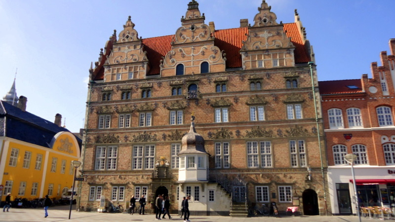 Jens Bangs Stenhus